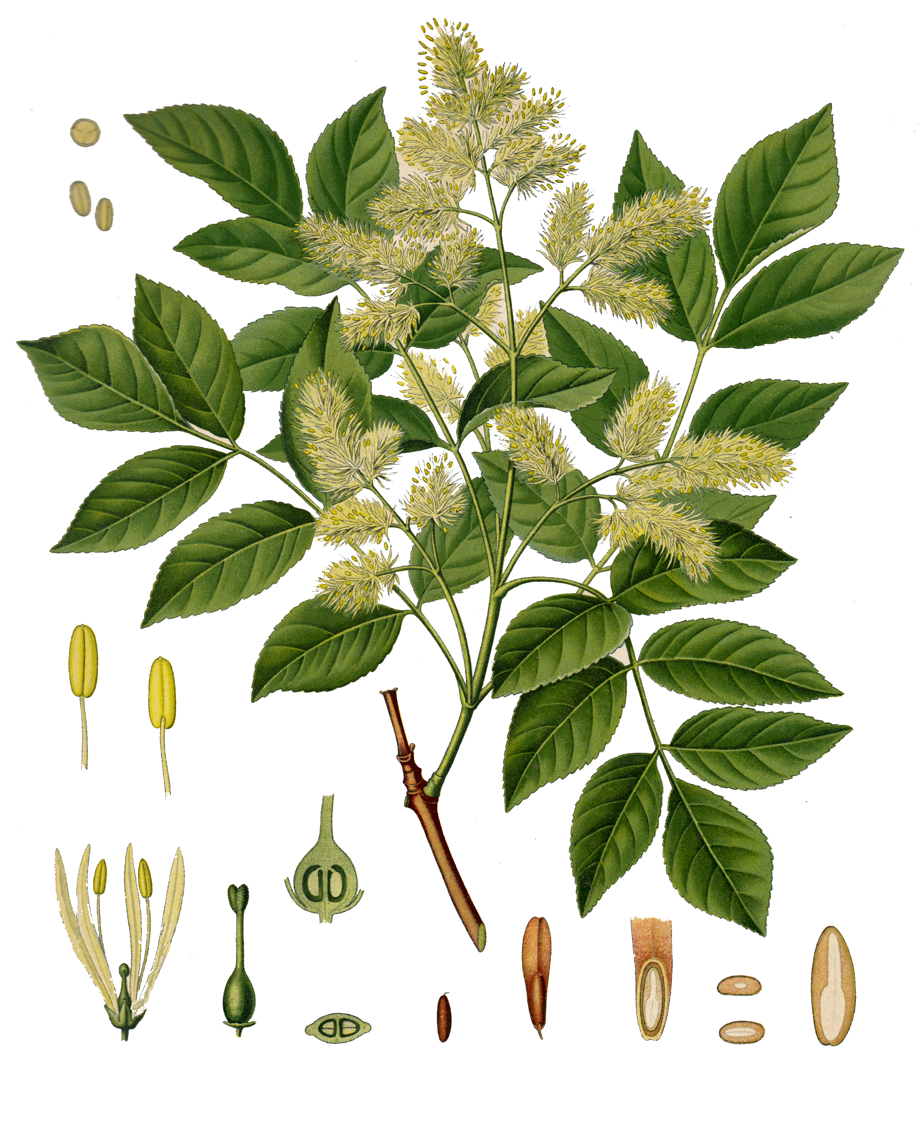 Abbildung der Esche (Fraxinus ornus)